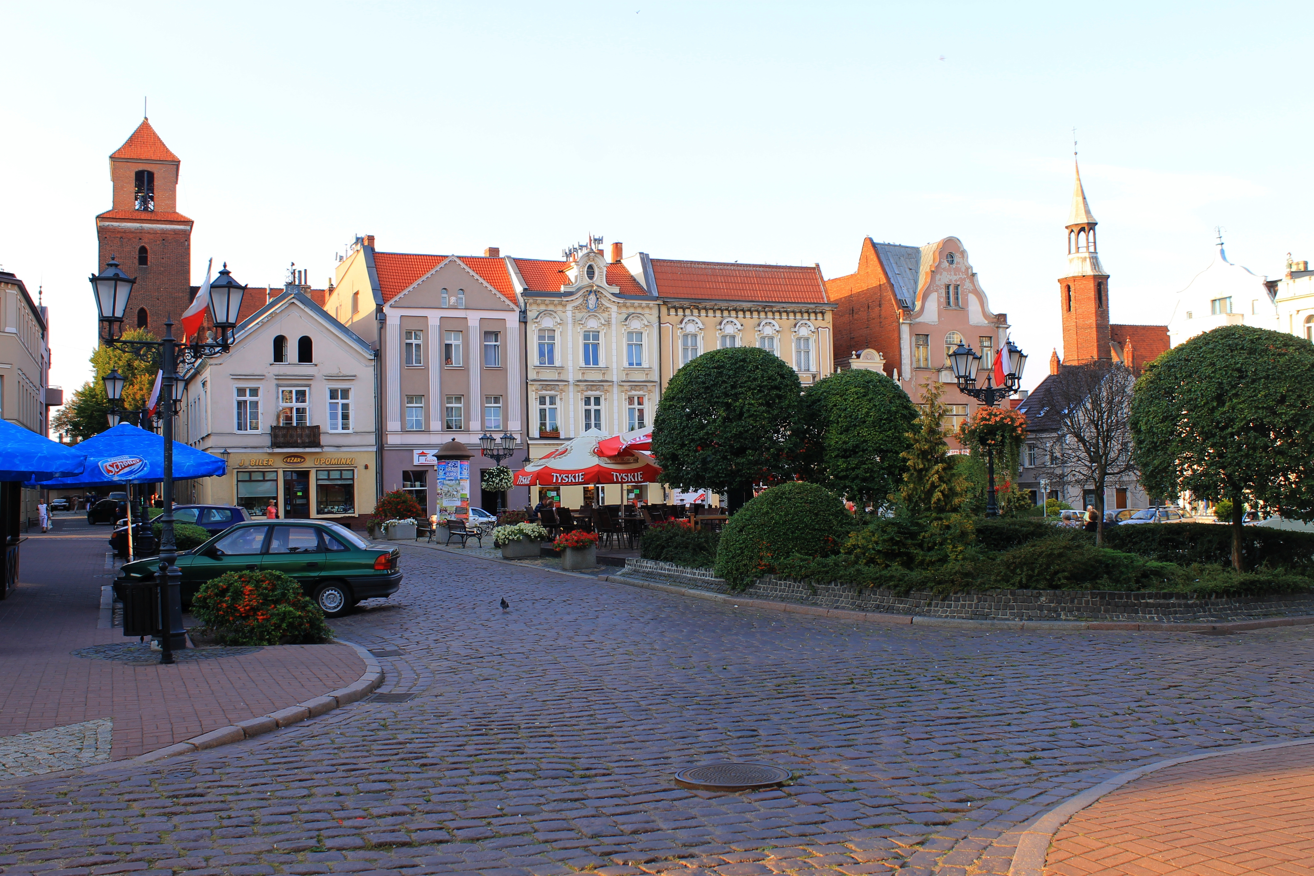 Plaza casco histórico.